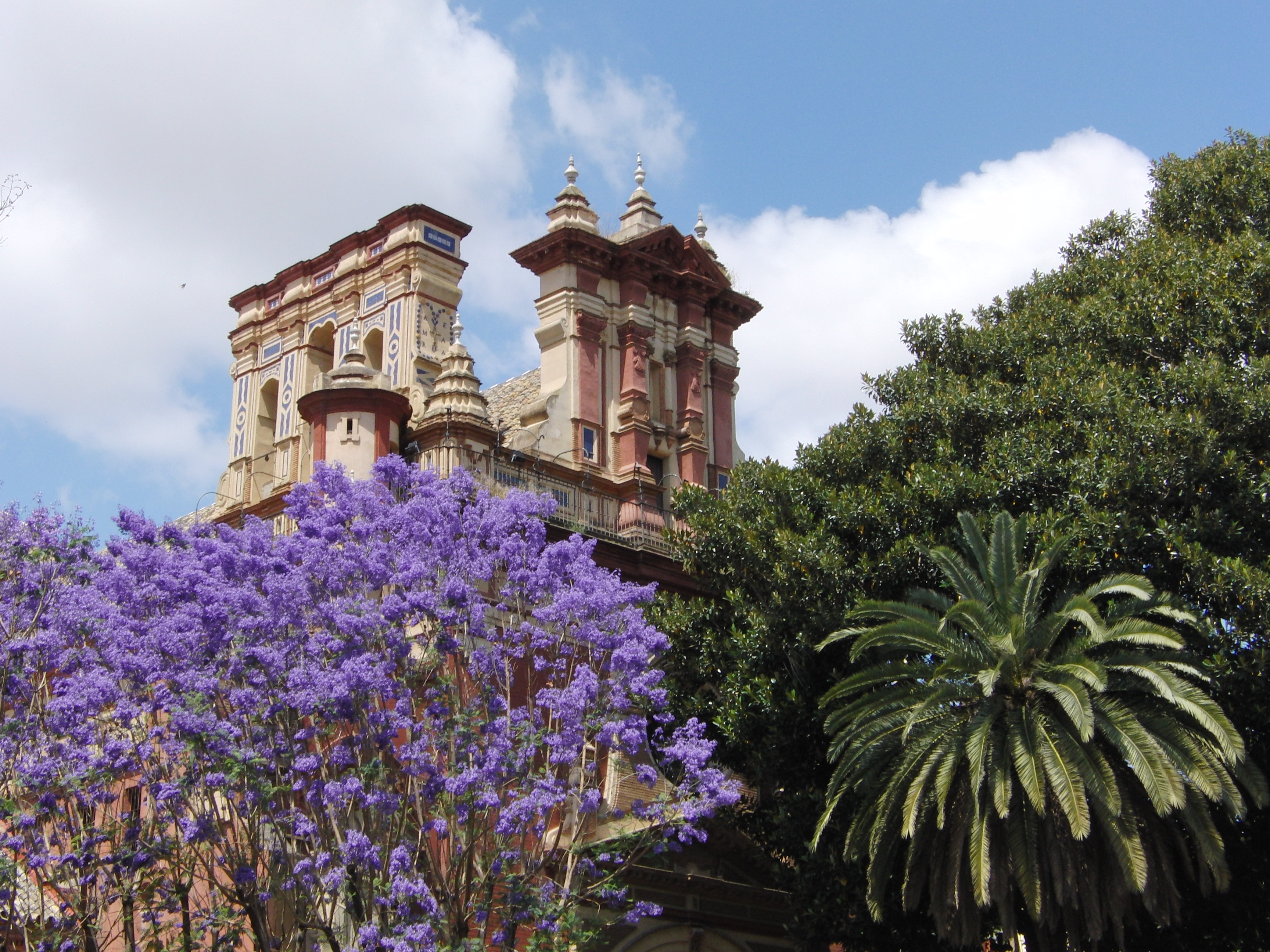 La Iglesia de San Jacinto, perteneciente al antiguo Convento de San Jacinto, construido en 1676 para la Orden de los Dominicos, por el arquitecto Matías de Figueroa.